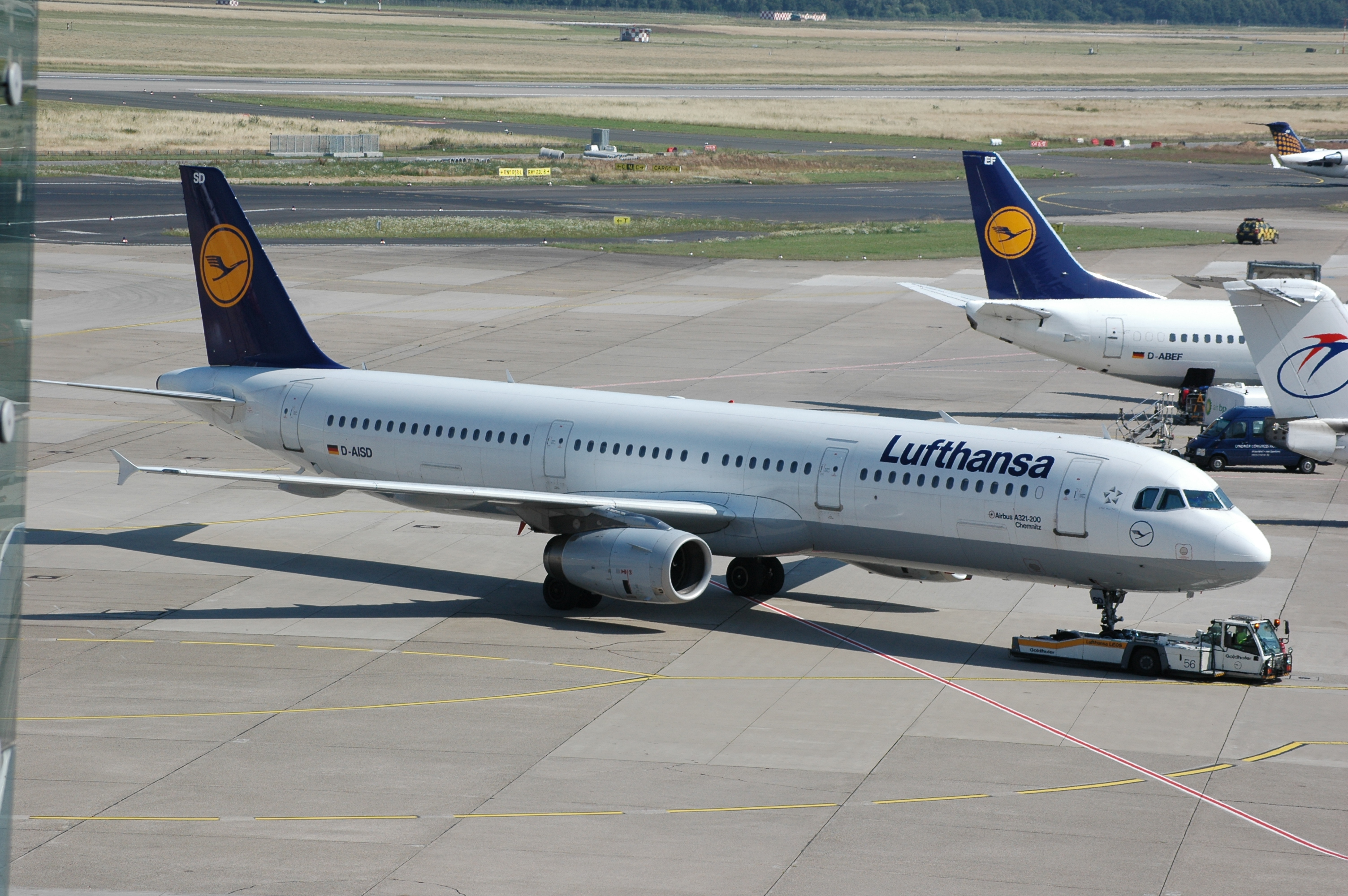 Airbus A321-200